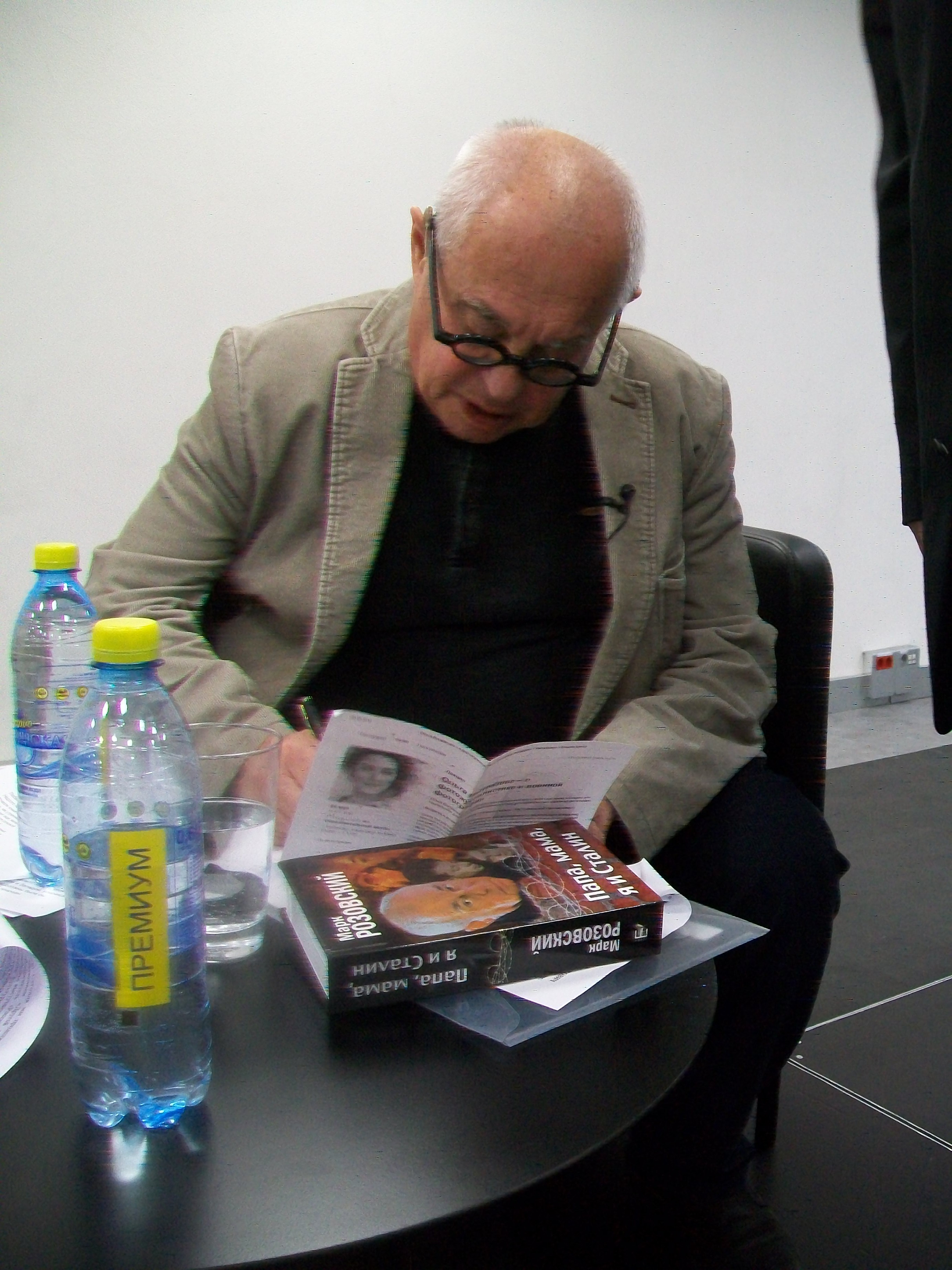 Режиссер Марк Григорьевич Розовский в Ельцин-центре дает автограф. 30 мая 2018 года